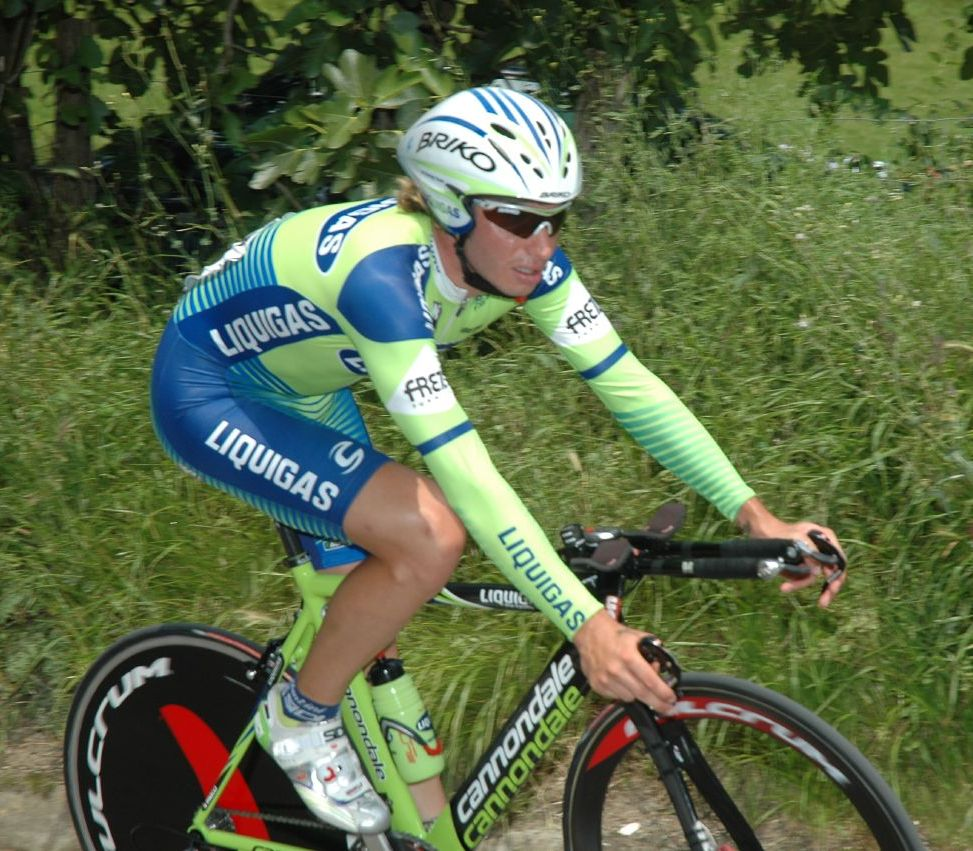 Francesco Failli, Euskal Bizikleta 2007